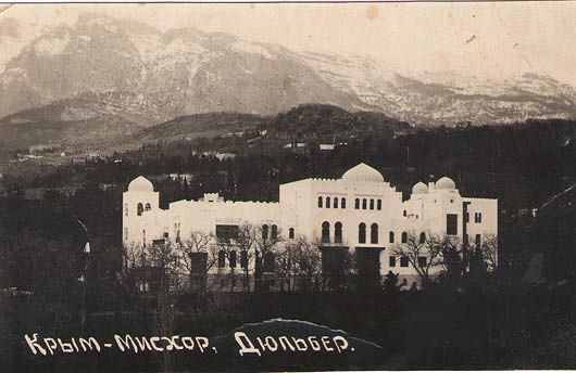 Мисхор, Дворец Дюльбер.